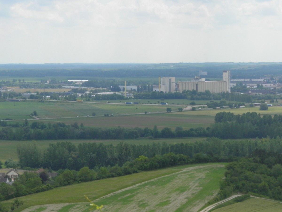 Zone industrielle de Vitry-Marolles vue du Mont de Fourche à Vitry-en-Perthois.